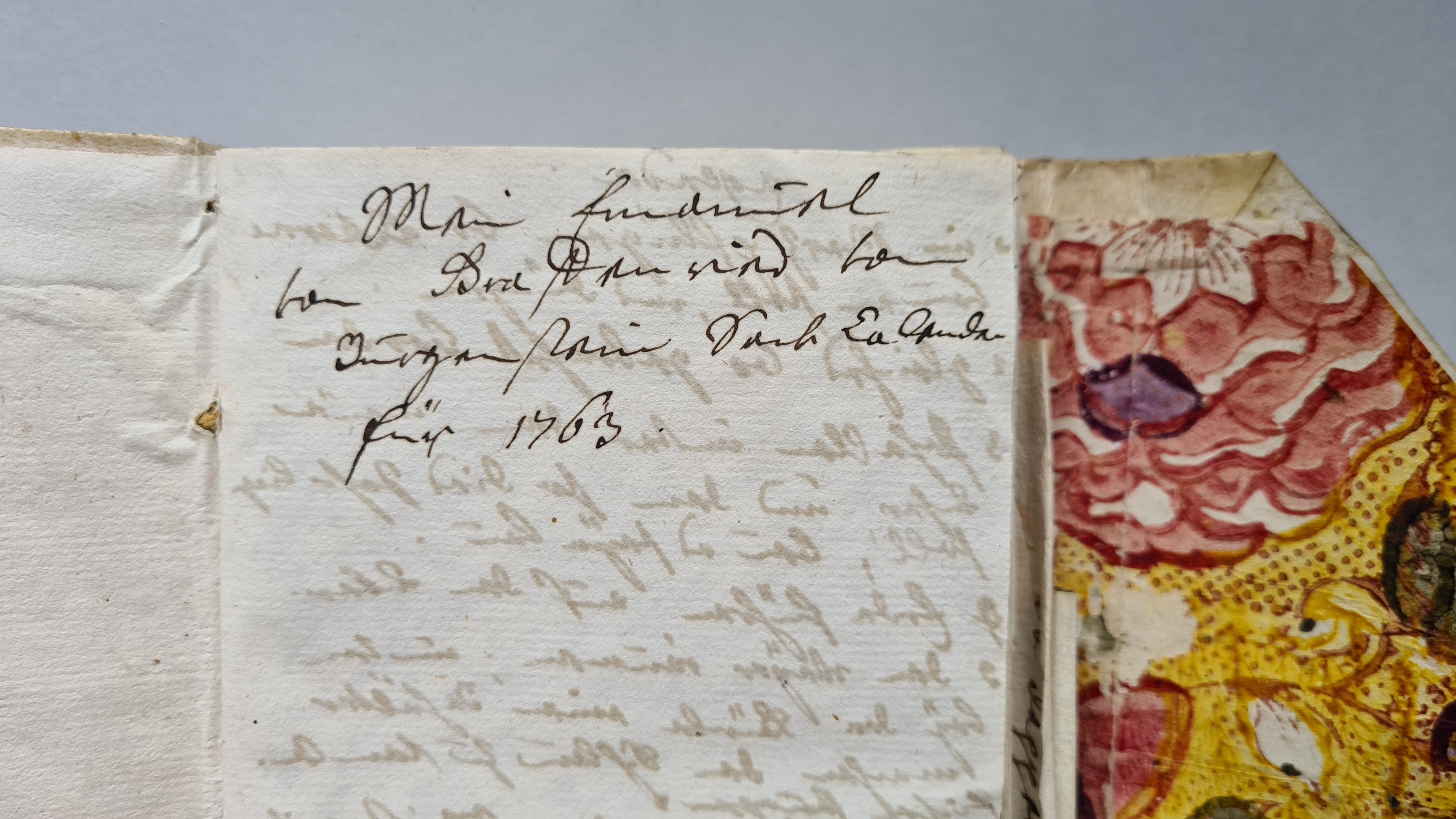 Sackkalender Emanuel von Graffenried 1763